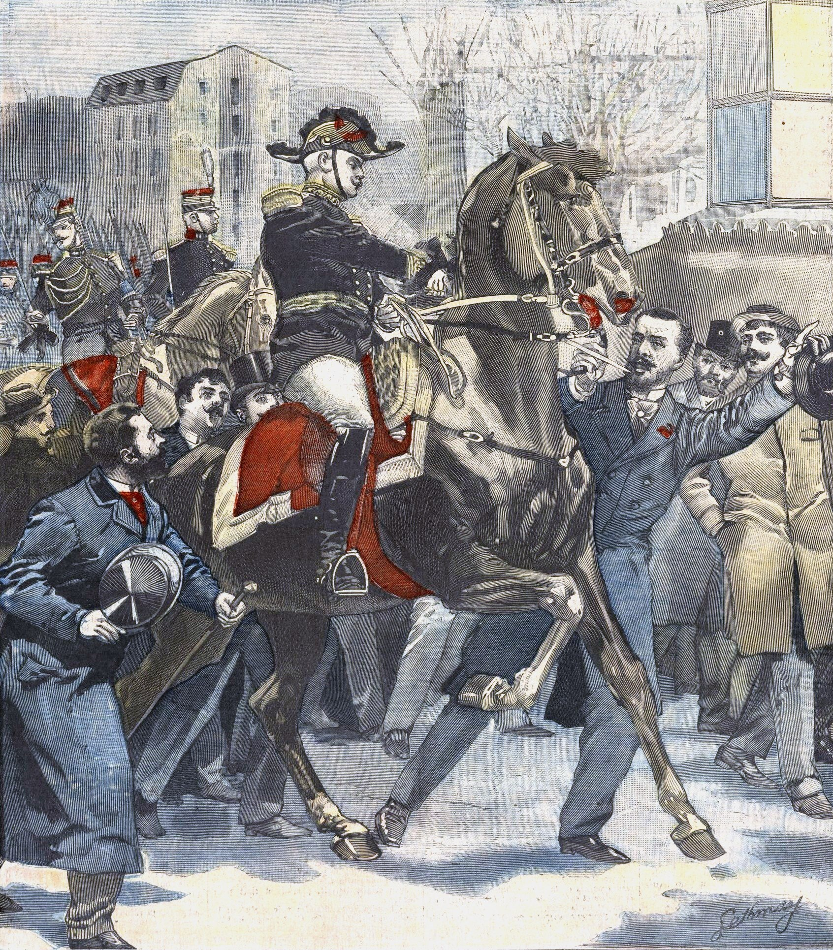 "Paul Déroulède interpellant le général Roget le jour des obsèques du Président Félix Faure".